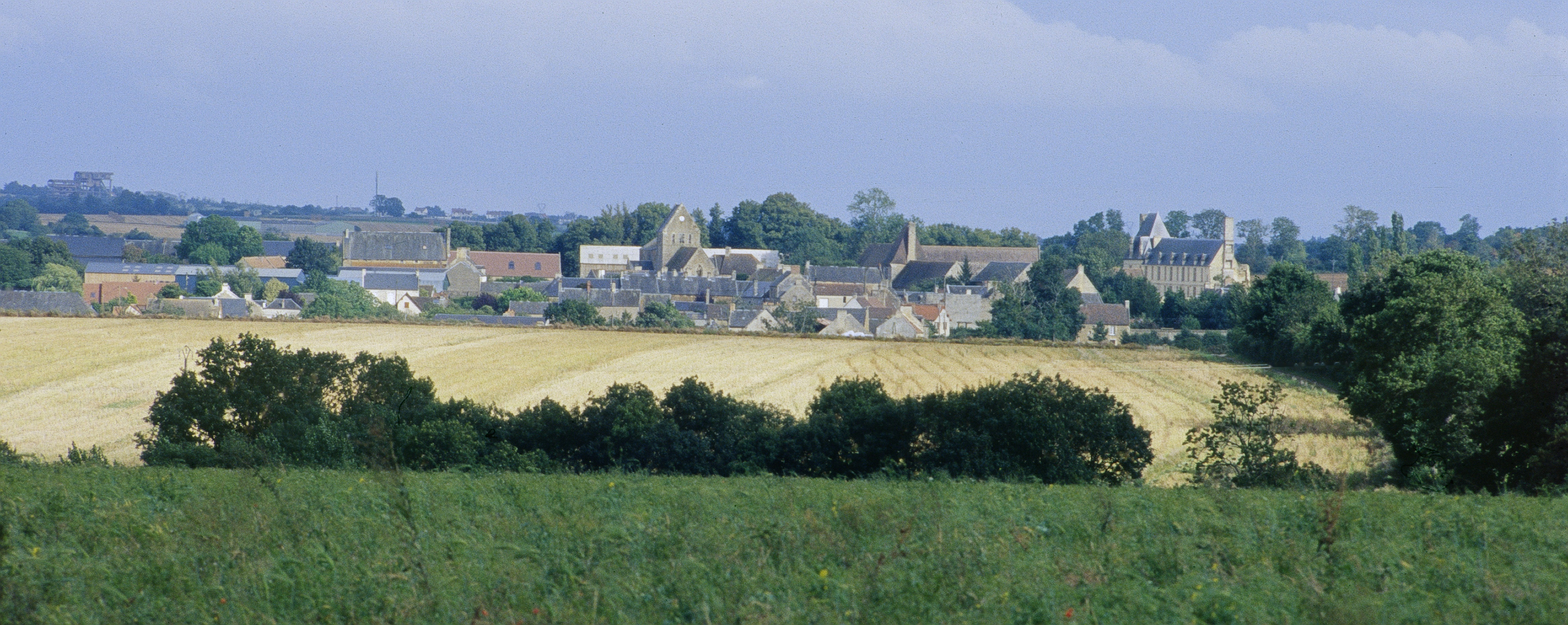 Fresney-le-Puceux, village of Calvados, France